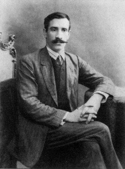 Александр Грин в 1910 году